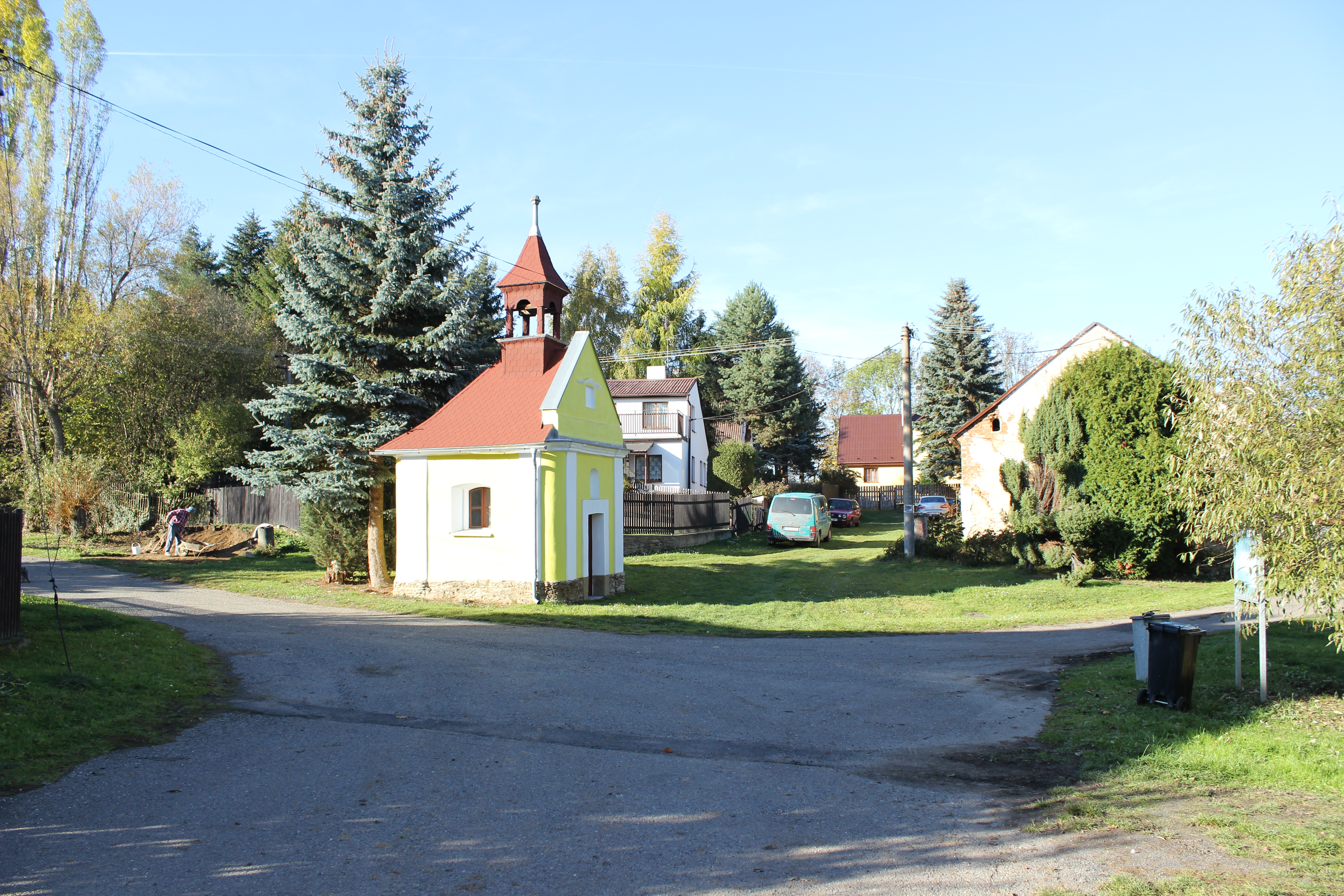 Náves v Kovářově, části Čichalov.